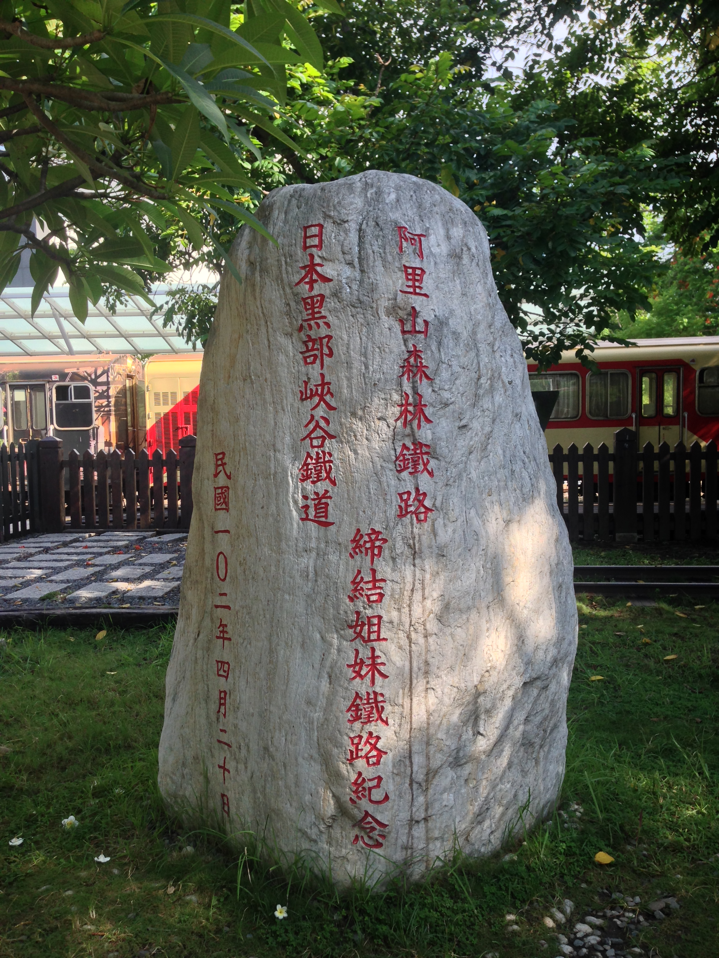 中文（台灣）: 2013年4月20日阿里山森林鐵路與日本黑部峽谷鐵道締結姐妹鐵路紀念石